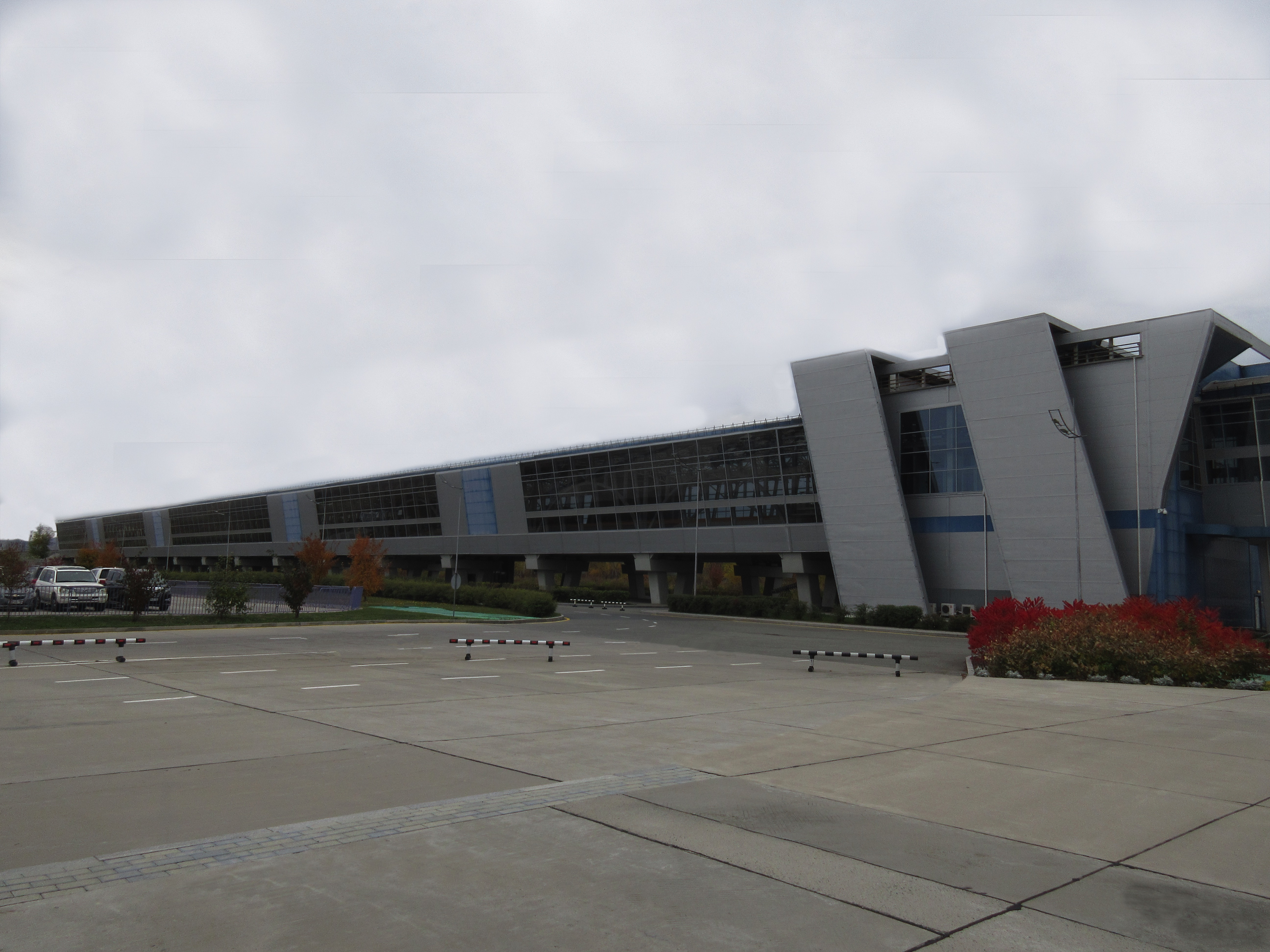 クネヴィッチ駅の駅舎